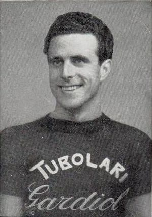 Georges Senfftleben, Champion de France de vitesse